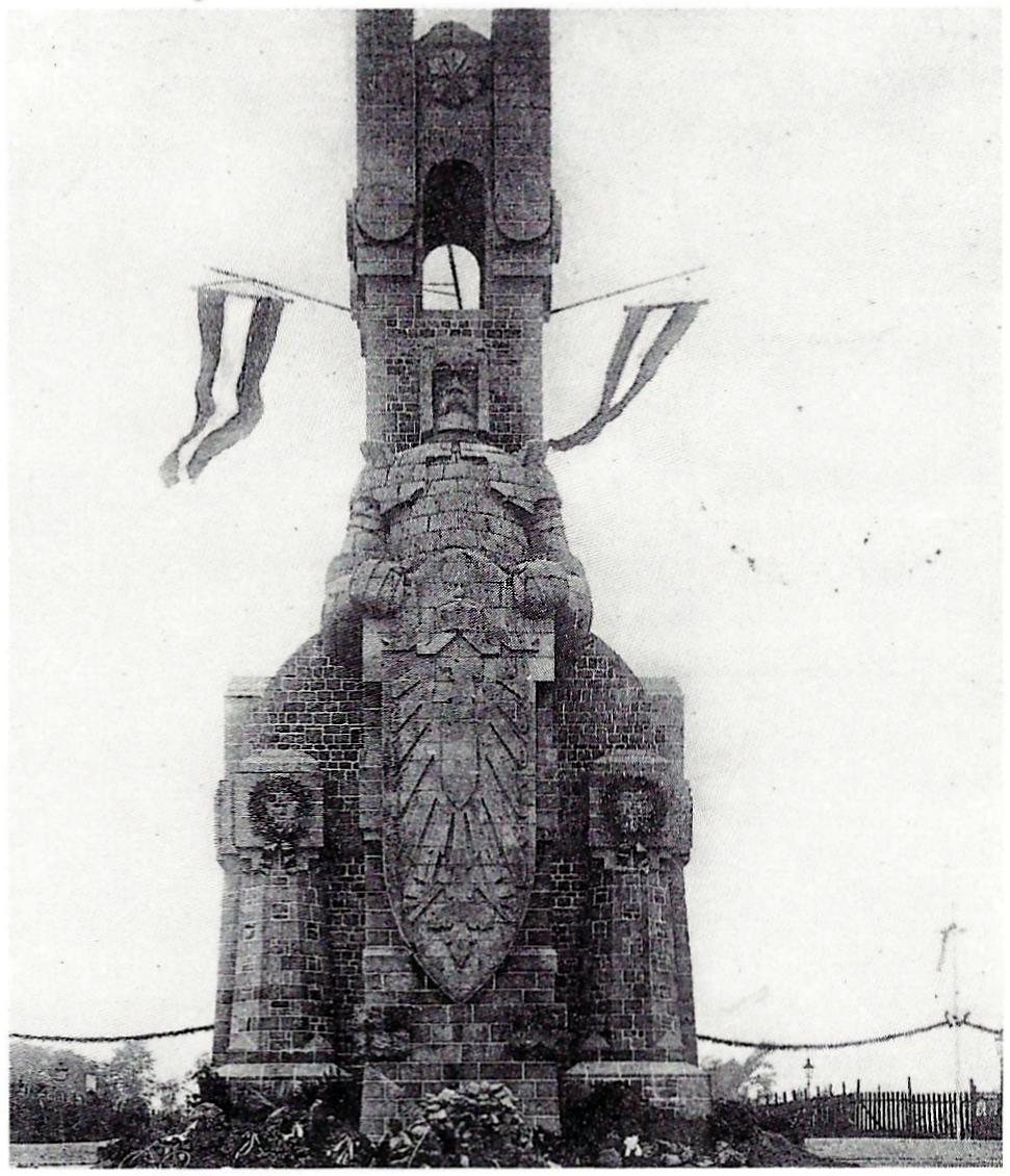 Bismarckturm, Köln-Marienburg: Zustand unmittelbar nach den Einweihungsfeierlichkeiten